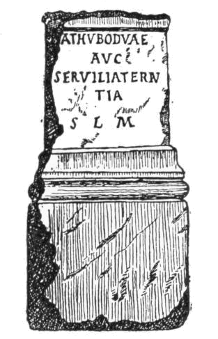 Cathbodua に捧げられた碑文 (CIL XII, 2571)